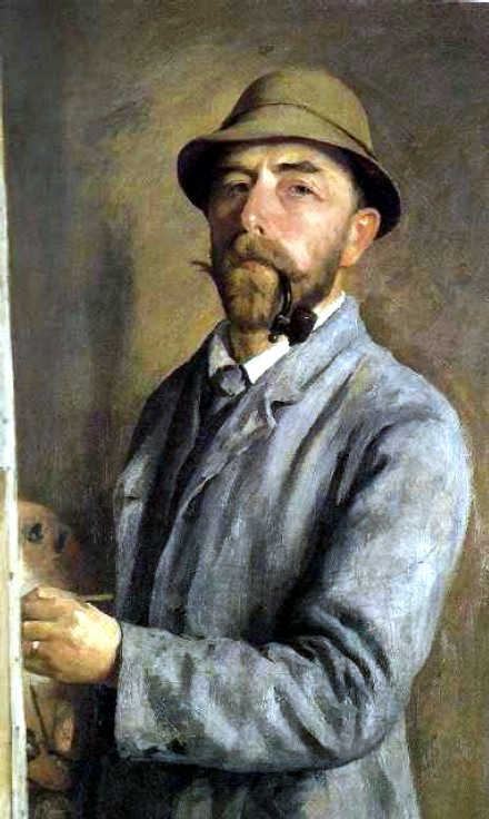 Hermann Linde: Selbstbildnis - self portrait